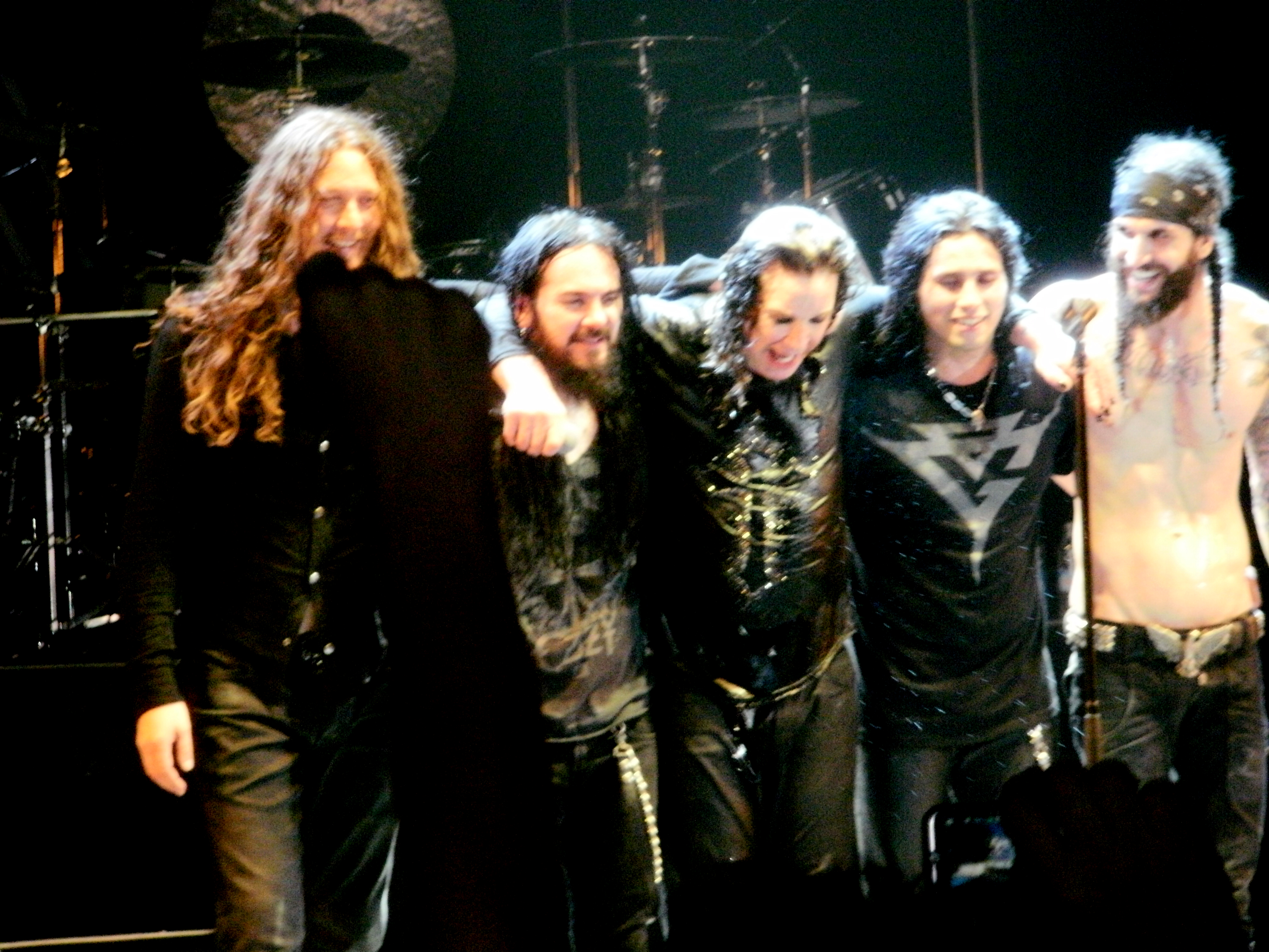 Ozzy Osbourne actuando en el Hammersmith Apollo, el 21 de junio de 2011.